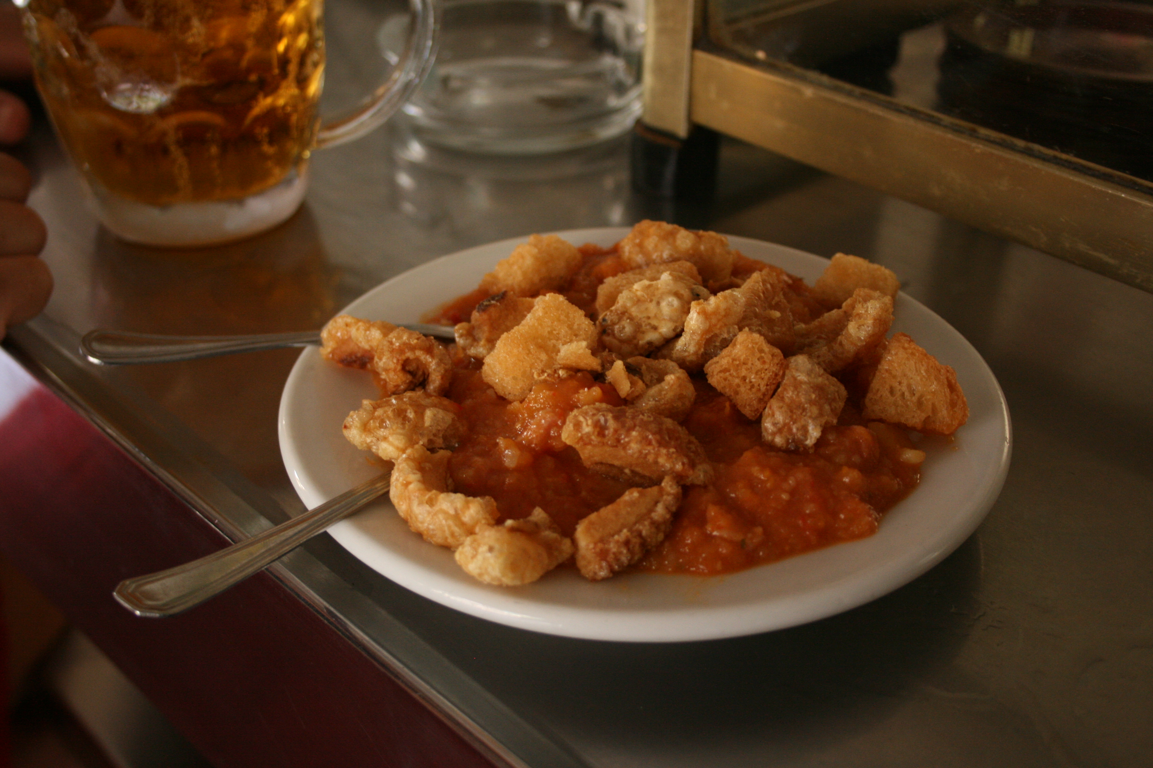 Patatas revolconas - Con abundantes torreznos